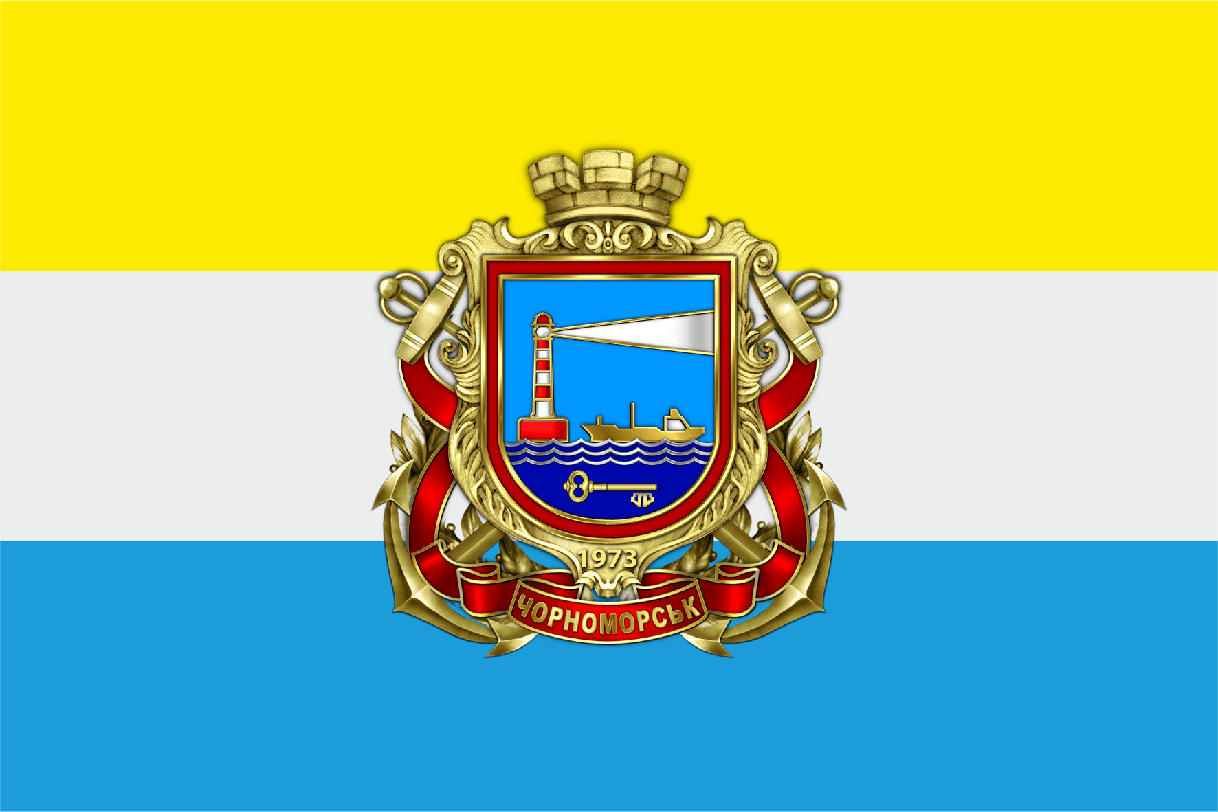 Прапор Чорноморська